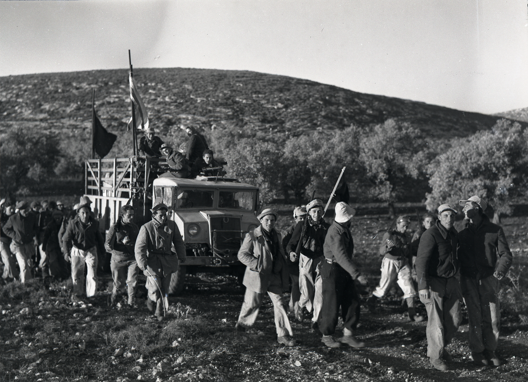 עליה לקיבוץ יסעור 3 צלם בנו רותנברג 1949 גנזך המדינה